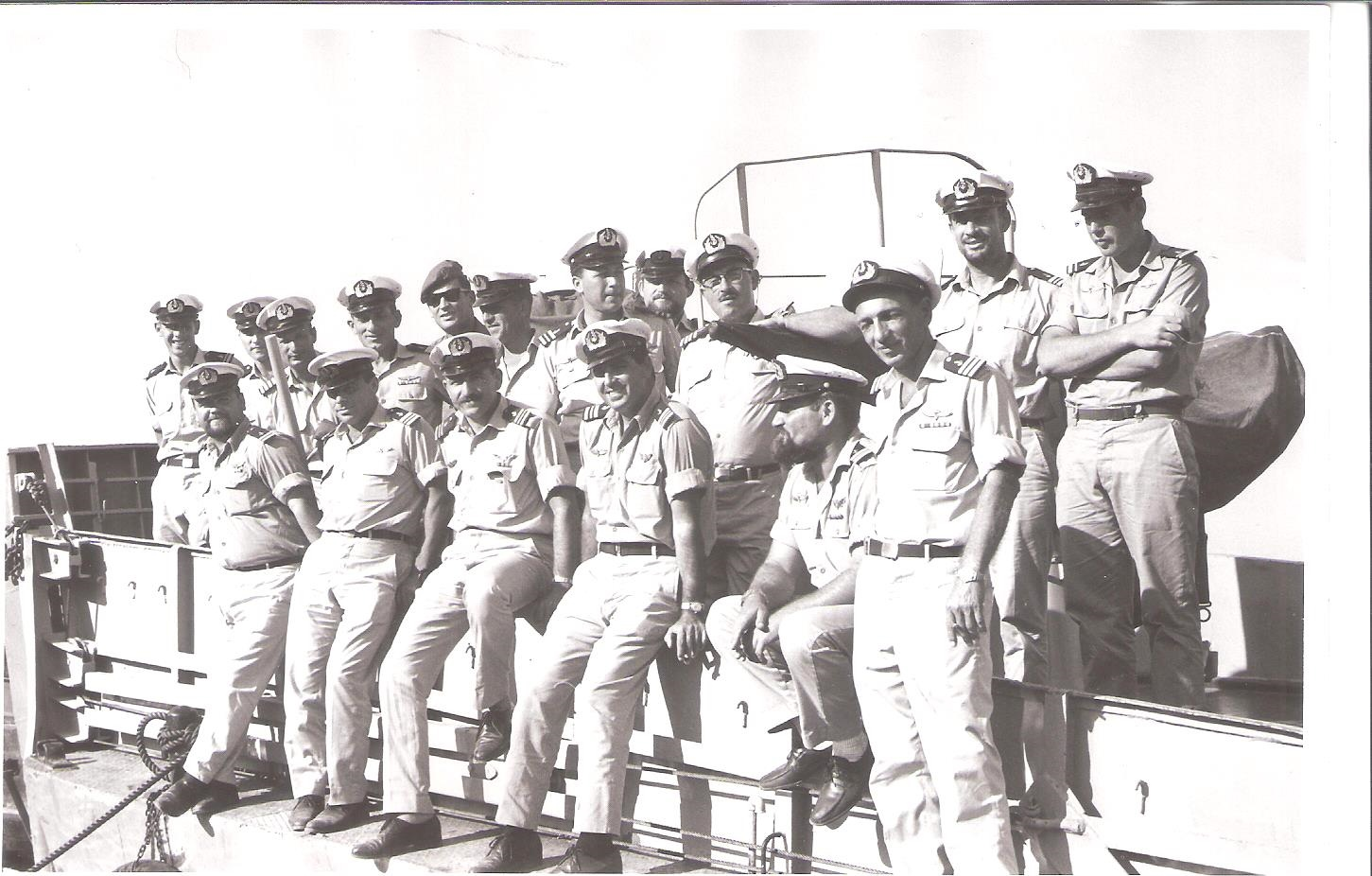 כנס מפקדי פלגה 788 בכנרת עם פיקוד חיל הים